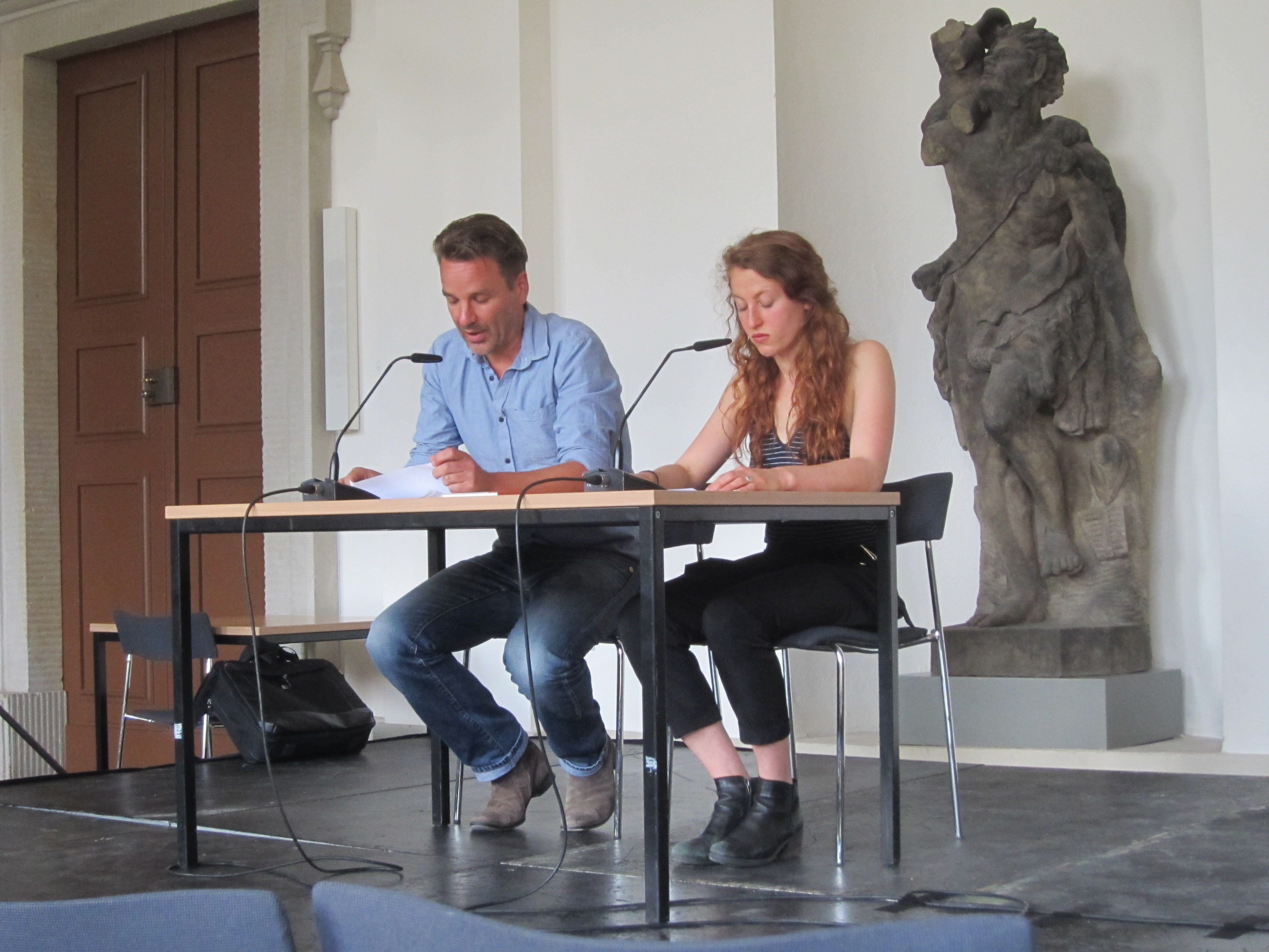 Martin Heckmanns liest im Palais im Großen Garten zur Saisoneröffnung des Staatsschauspiels Dresden aus seinem Buch Konstantin im Wörterwald (Im Hintergrund die Statue Tanzender Satyr mit Erosknaben, 1839/40 von Julius Moritz Seelig)